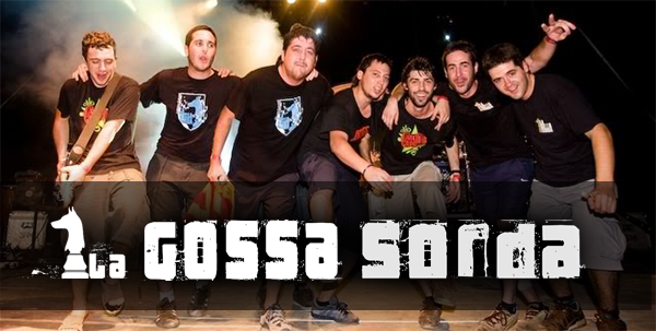 POREDBFC